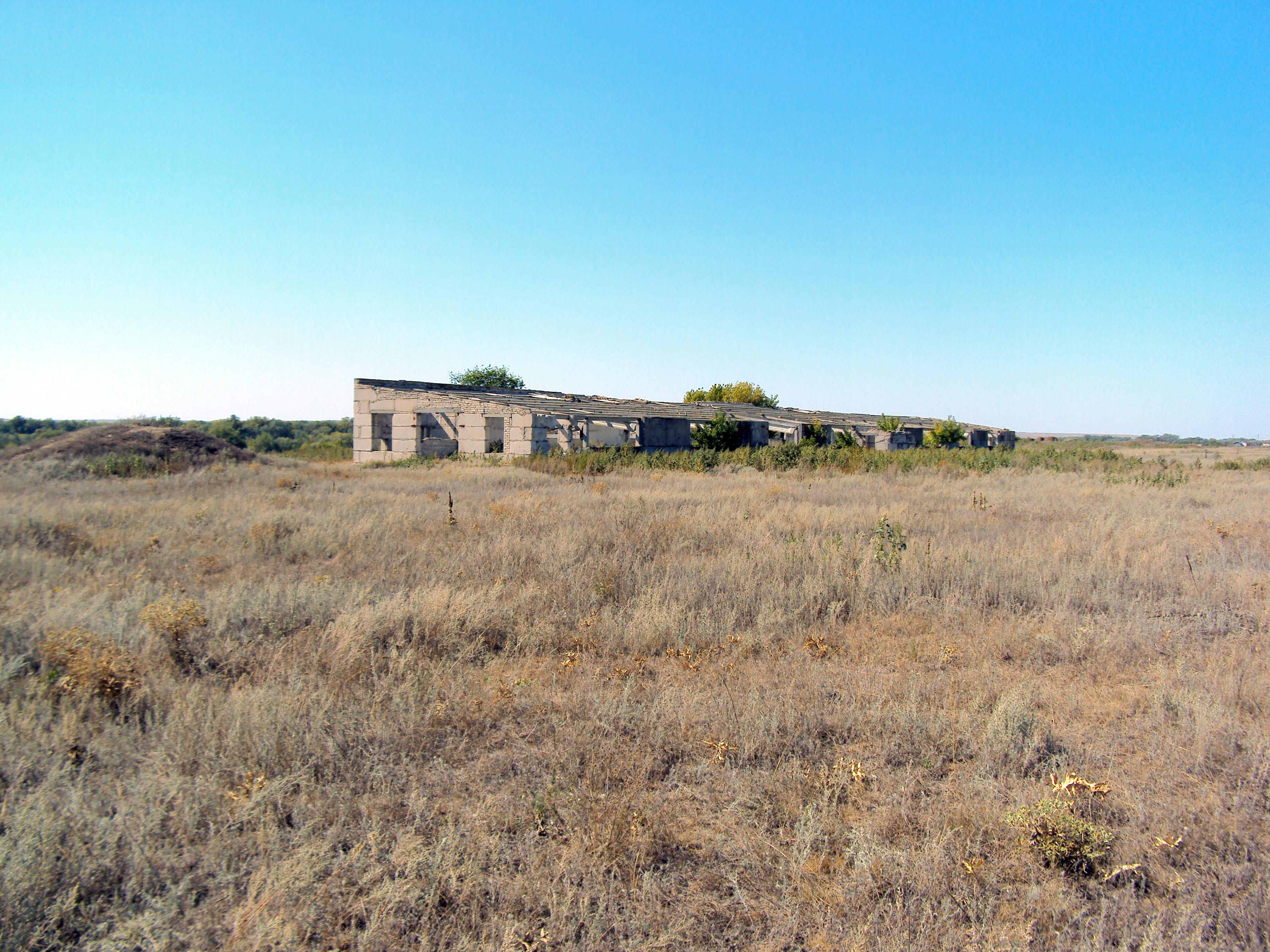 Разобранная ферма на хуторе Ярской 2.